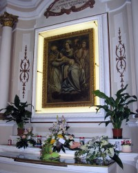 Madonna del Sudore, è un immagine artistica conservata lungo la navata laterale destra della Chiesa di San Pietro Apostolo.